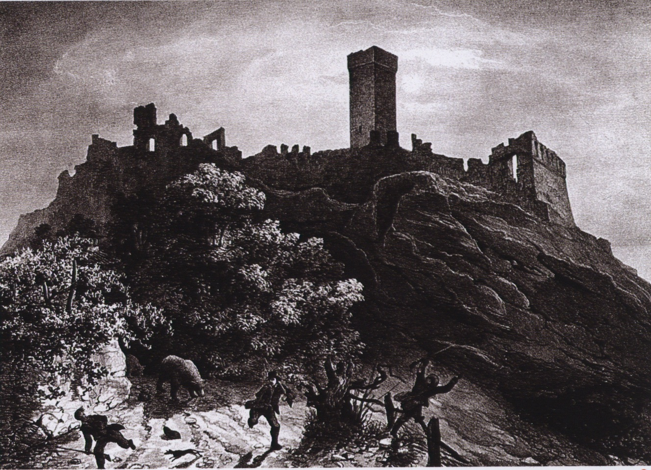 "Castello di Montjovet", litografia di E. Gonin, in Album delle principali castella feudali della Monarchia di Savoia, Torino: s.d. (1845-1854 circa). Fotografia della litografia realizzata da L'Image, Aosta, e conservata presso l'Archivio fotografico della Soprintendenza per i Beni Culturali. Il Castello di Montjovet, comune in cui ne sono presenti più d'uno, è oggi chiamato Castello di Saint-Germain.